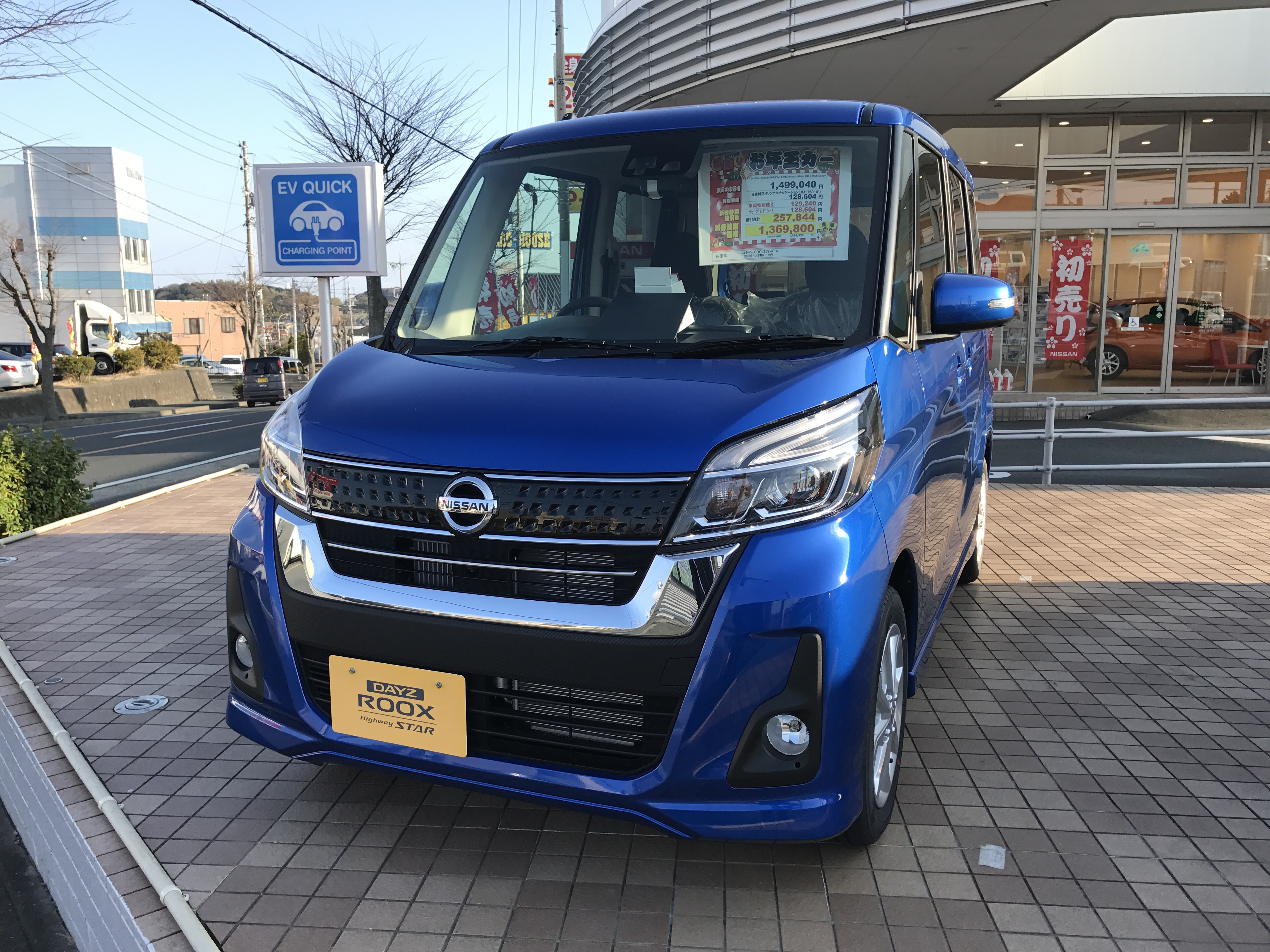 日産デイズルークス